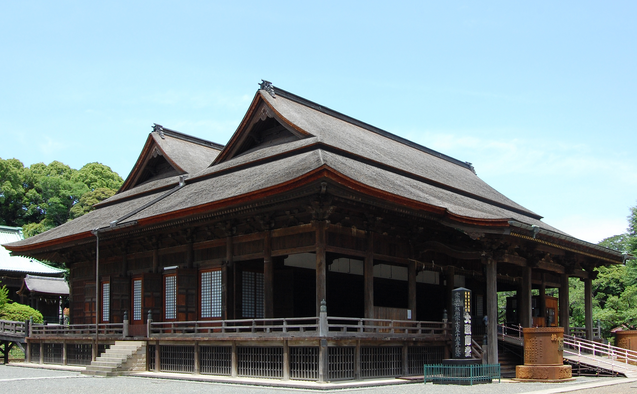 Hokekyouji, at Ichikawa, Chiba, Japan.